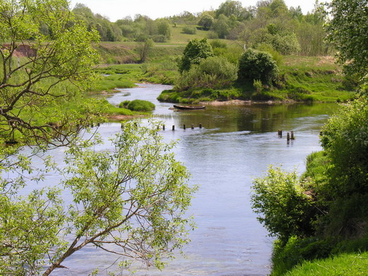 Griežė. Ventos ir Vadaksties (kair. viršutiniame kampe) santaka, kurioje buvo perkela. Čia eina Lietuvos-Latvijos valstybinė siena. Foto: Algirdas, 2006 m. gegužės 17 d., Lietuva